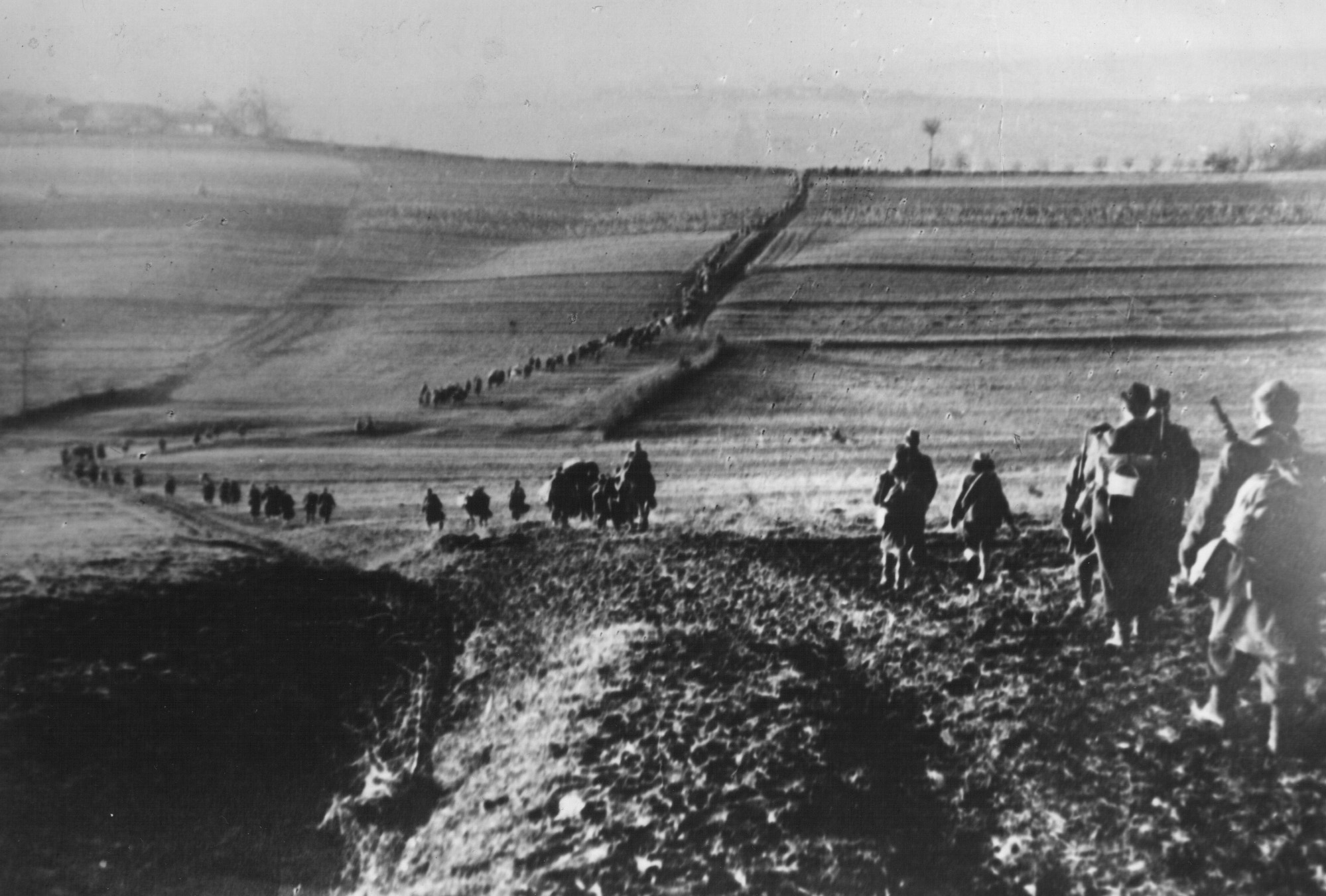 Srpskohrvatski / српскохрватски: 14. slovenska udarna divizija NOVJ u maršu preko Moslavine.